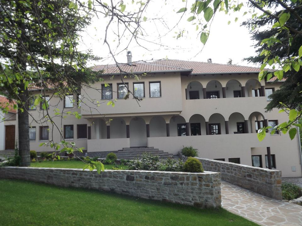 Srpski (latinica): Konak Manastira u Divljani, opština Bela Palanka, Srbija